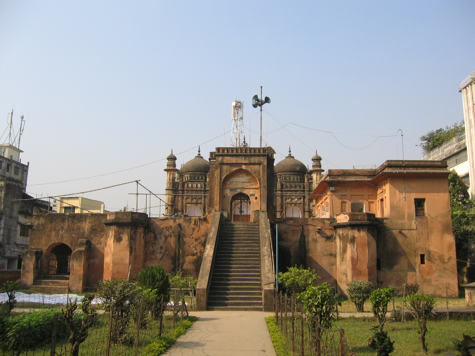 Khan Mohammad Mirdha's mosque in Old Dhaka, Bangladesh.